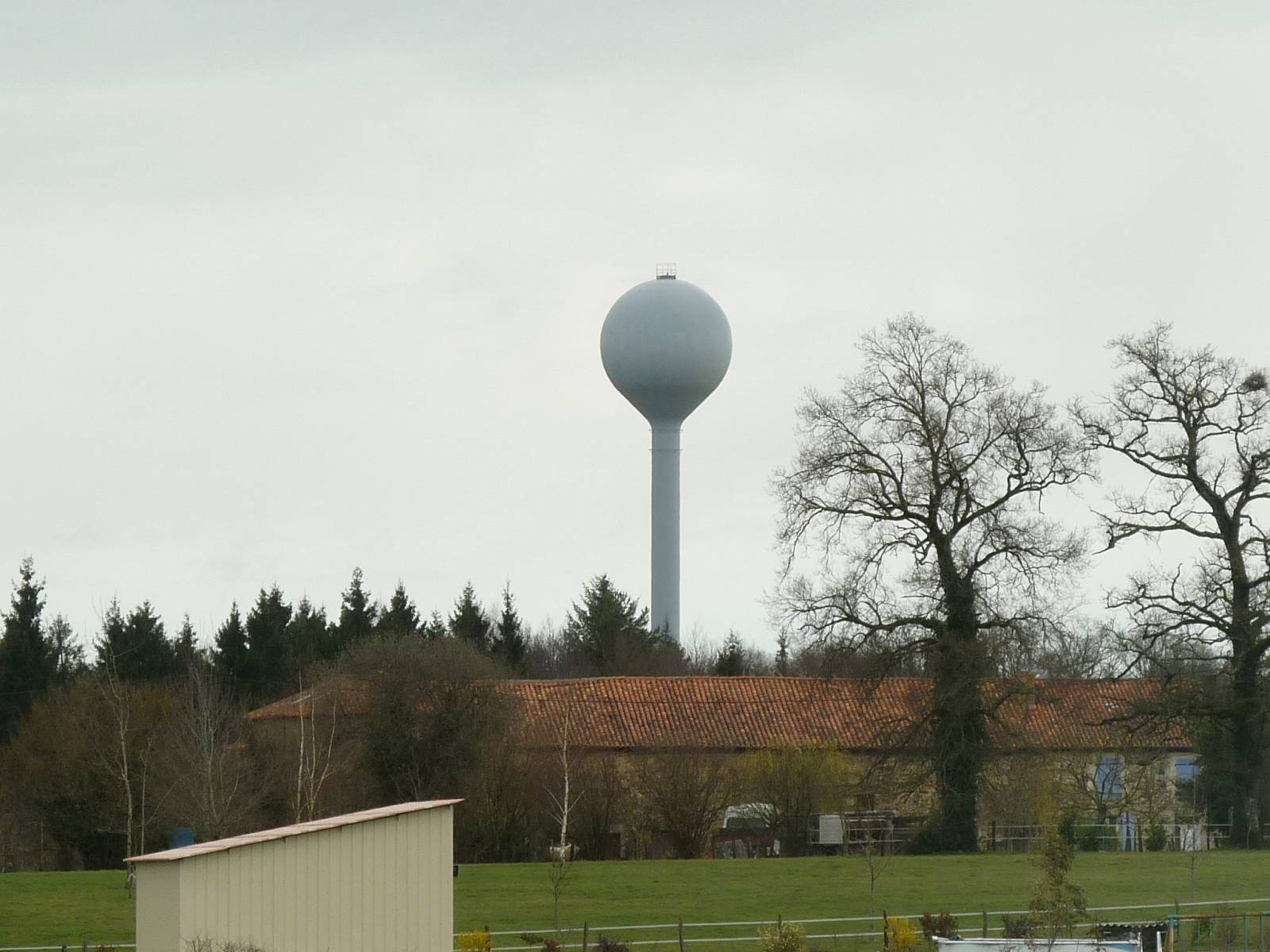 château d'eau de Sauvagnac, Charente, France